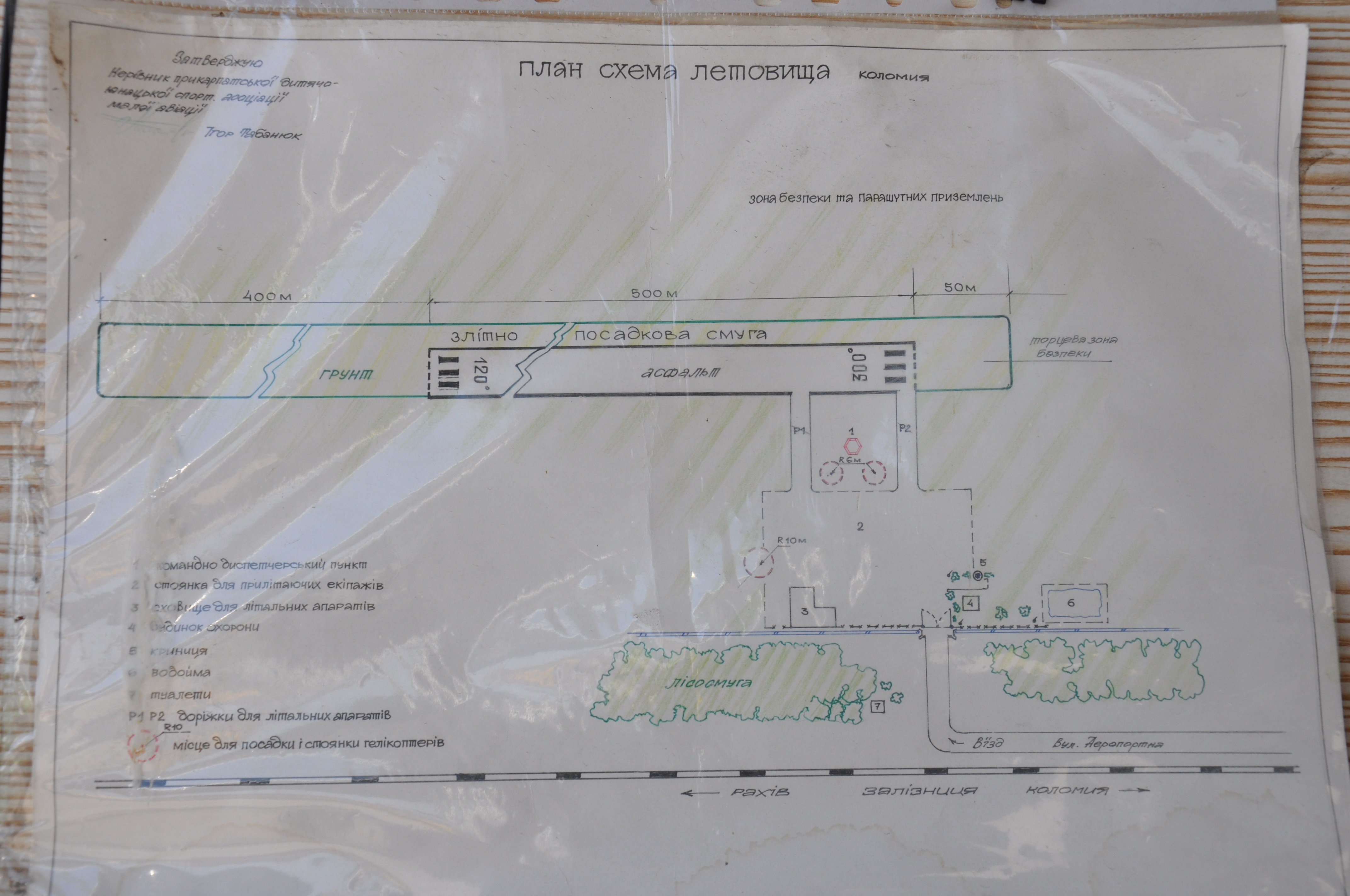 Схема а/д